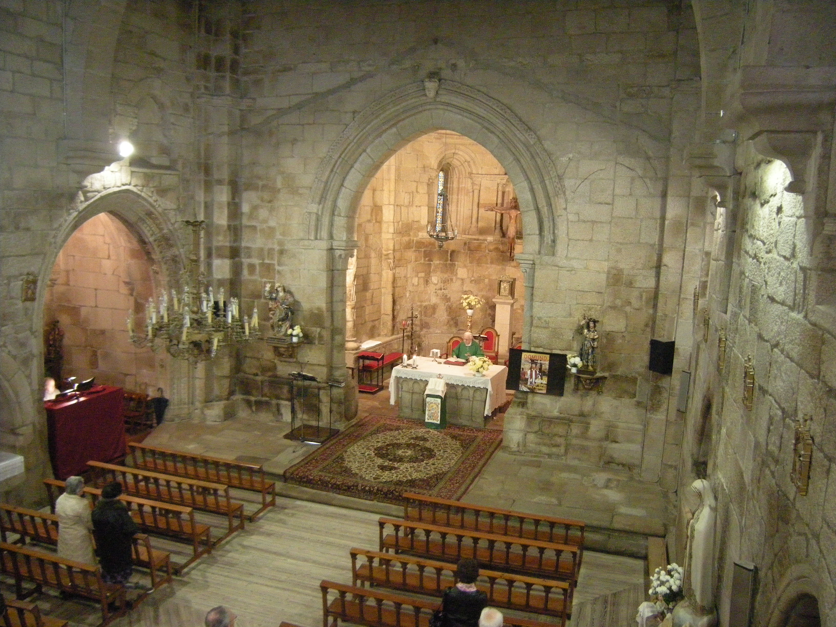 Igrexa de Santiago de Allariz.